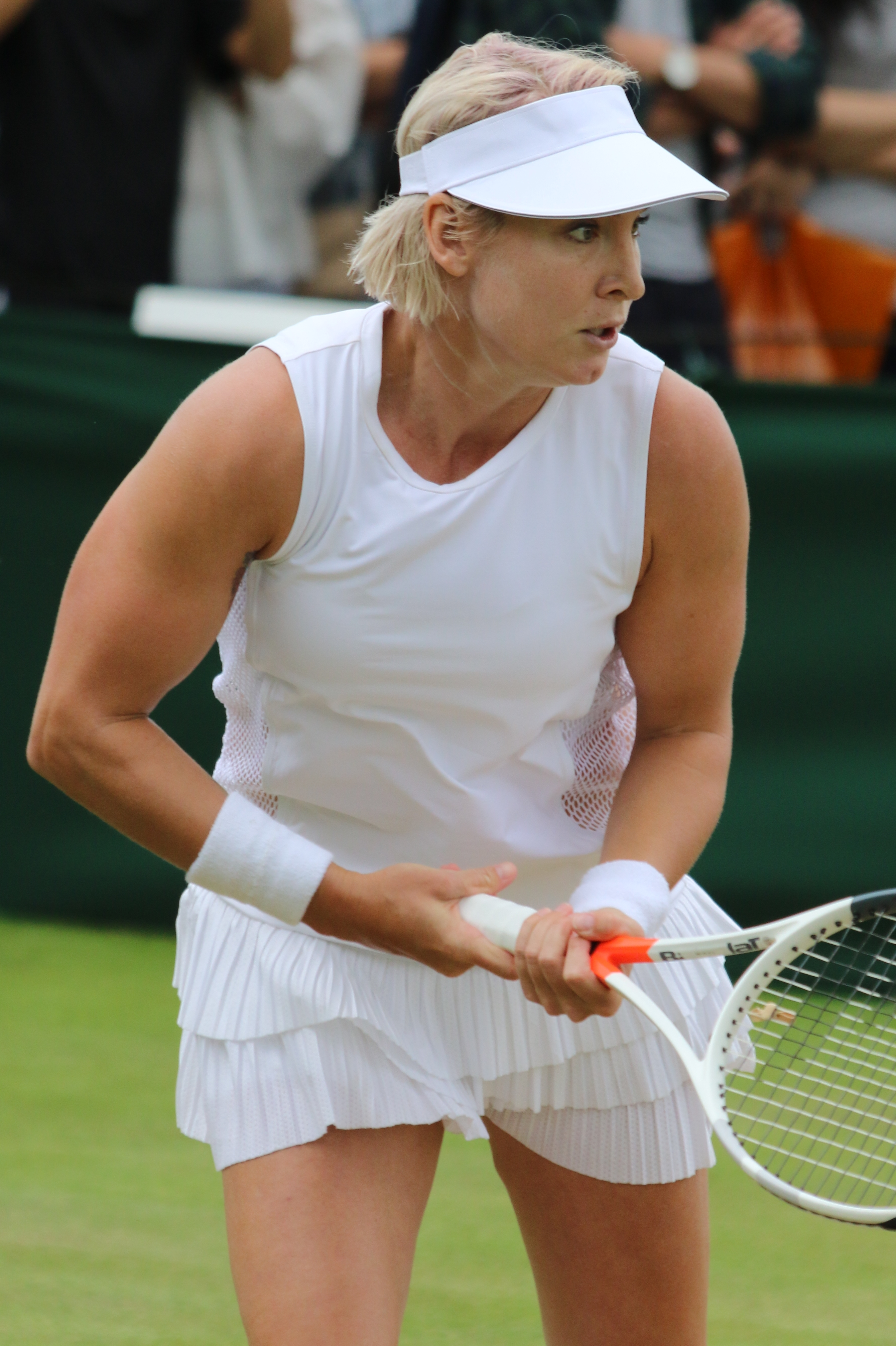 Mattek Sands WM17 (12)